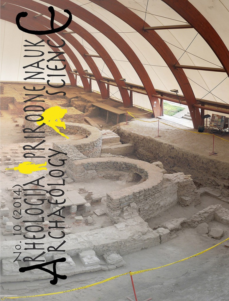 Naslovna stranica Arheologija i prirodne nauke